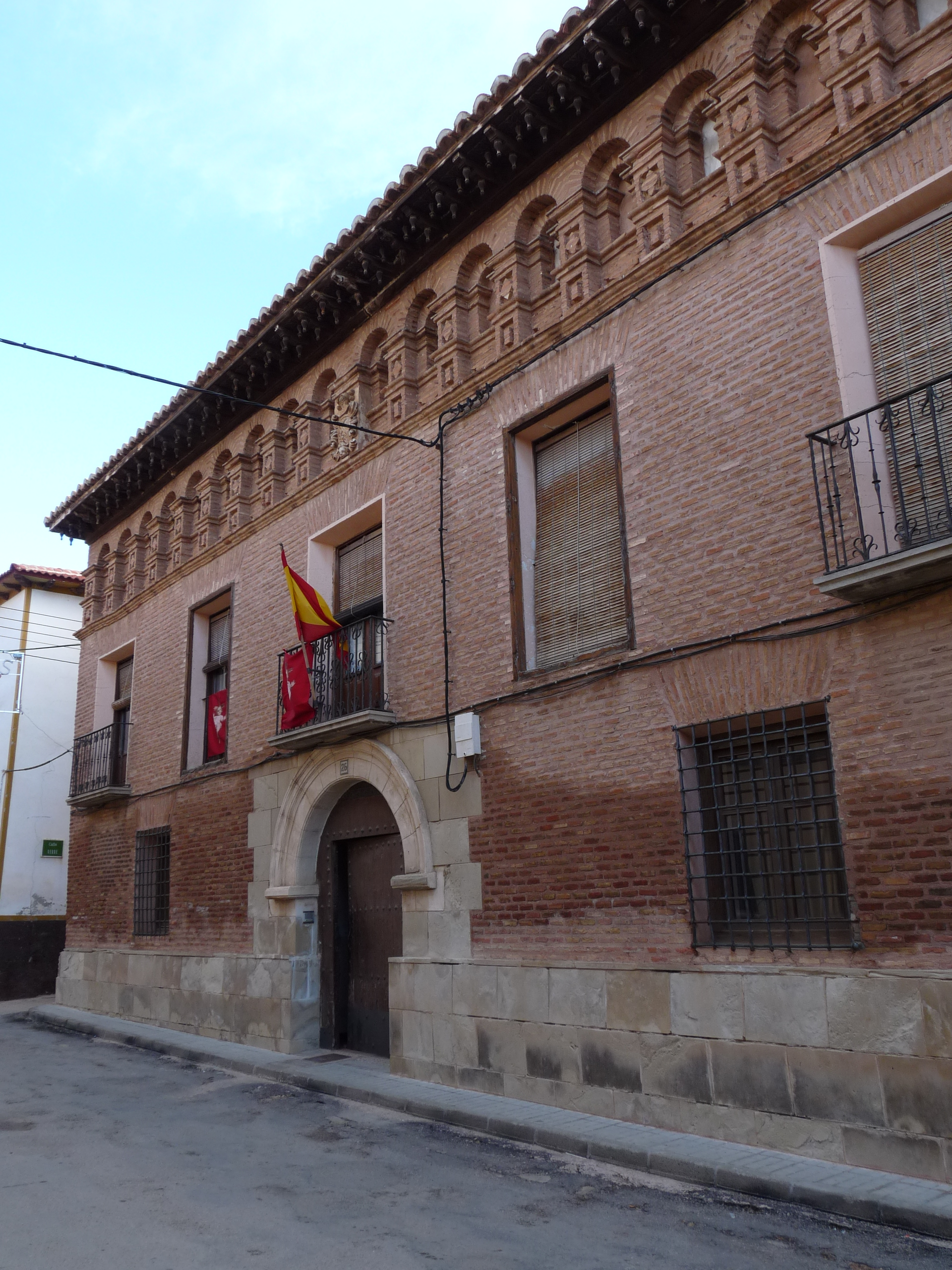 Muniesa - Casa Aranguren (s. XVII)